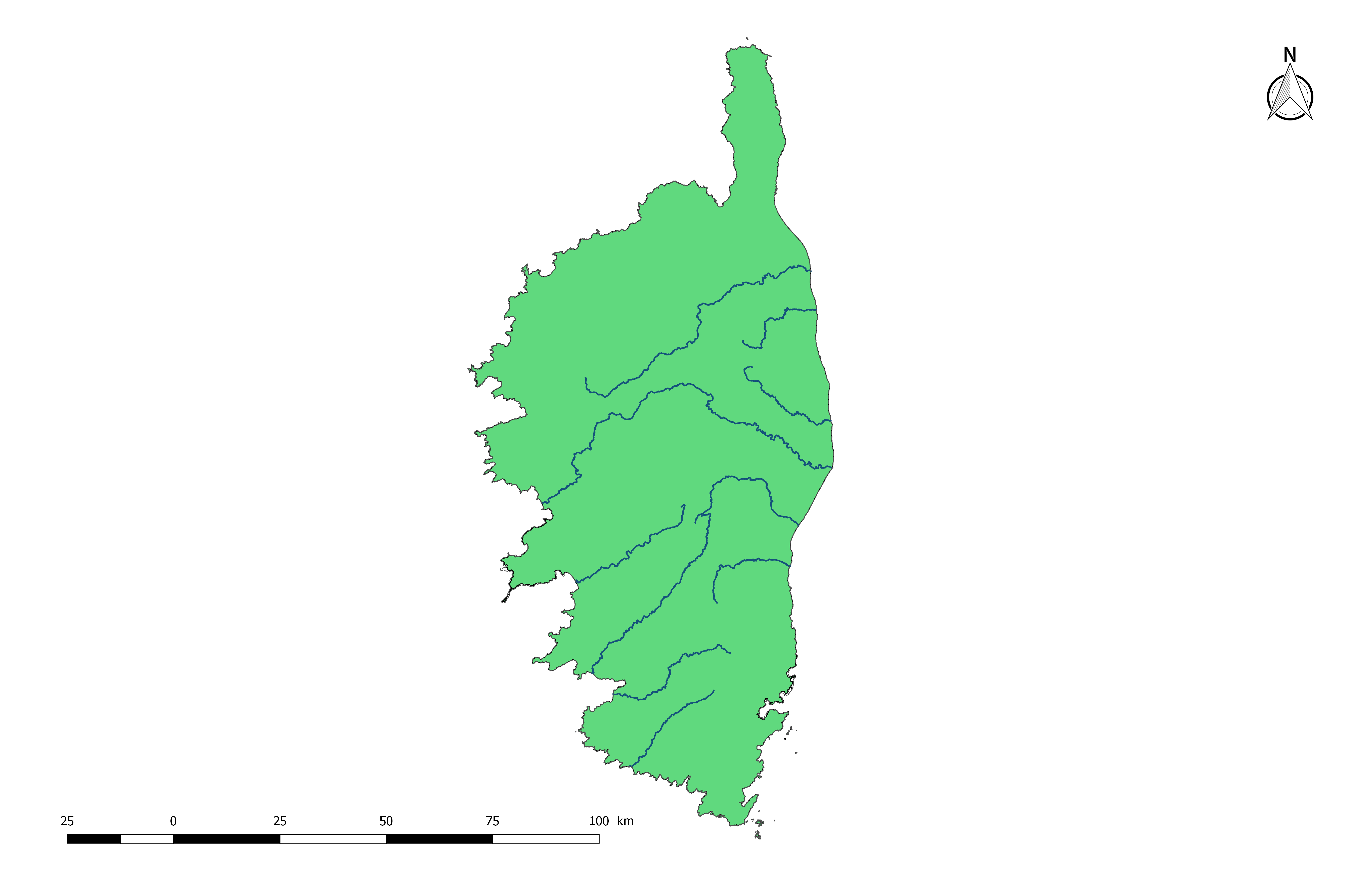 Carte de la circonscription de bassin Corse en France.